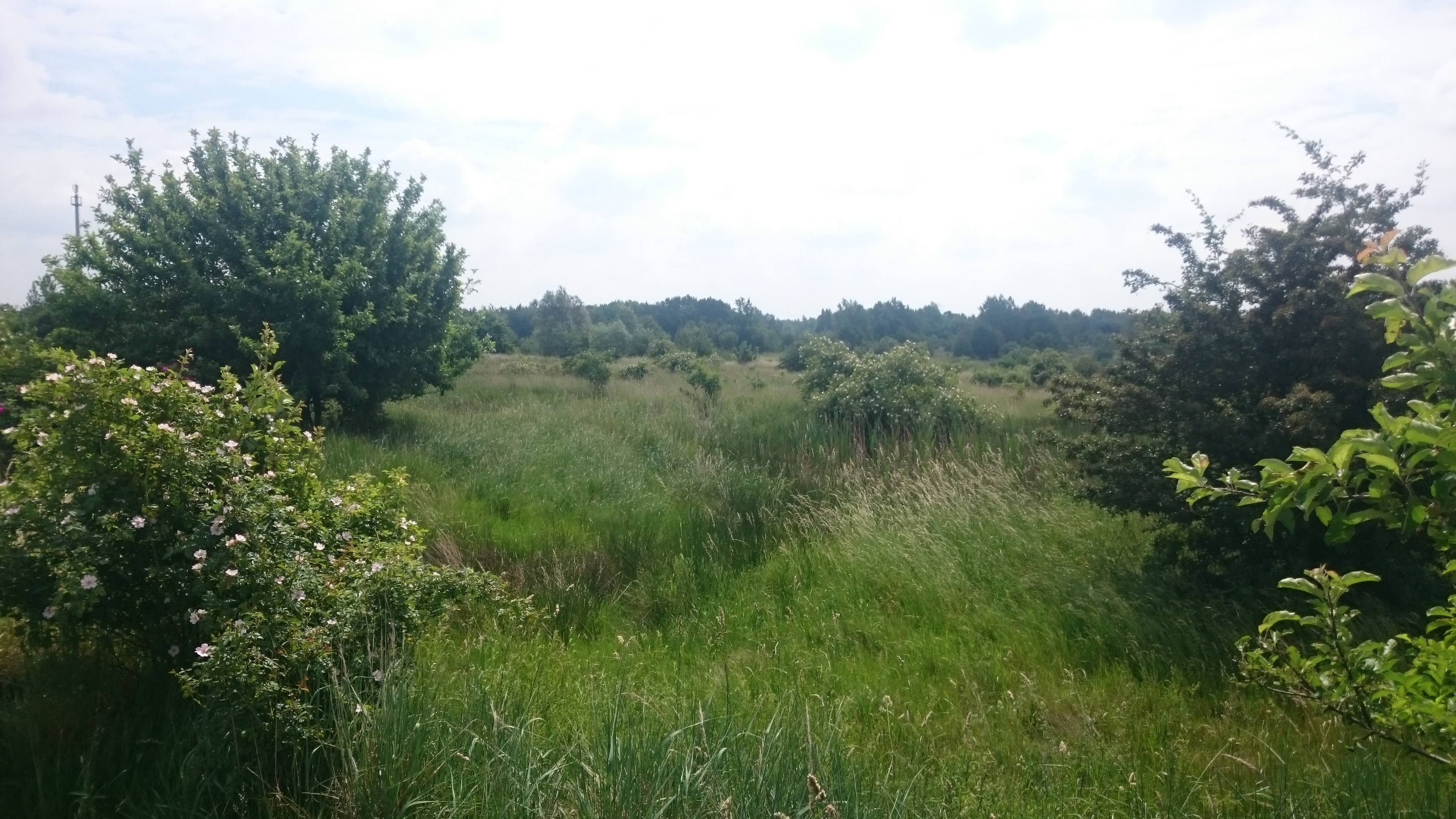 Das FFH Gebiet "Am Rümpfwald Glauchau"